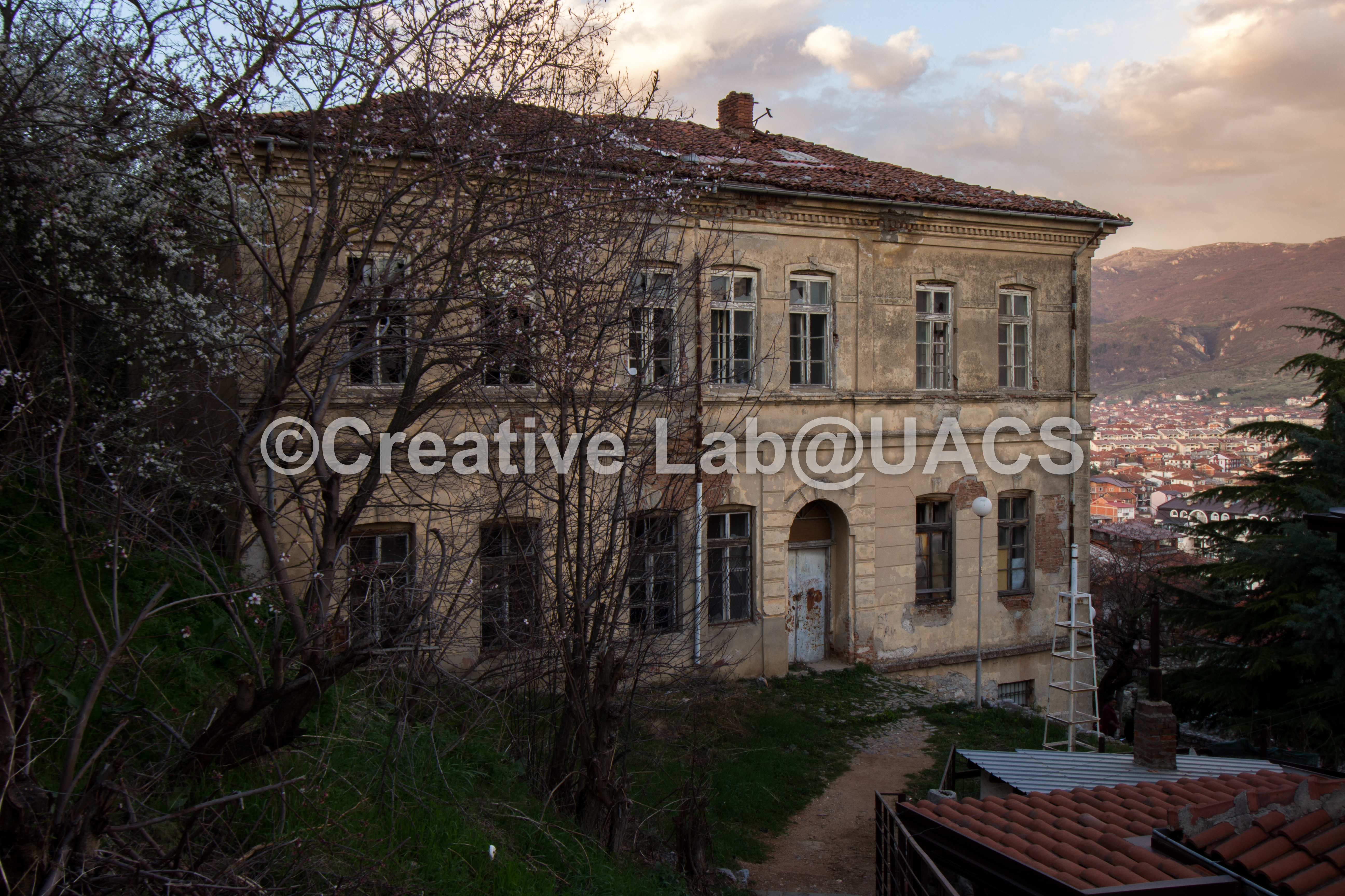 старото училиште свети Сава во стариот дел на Охрид